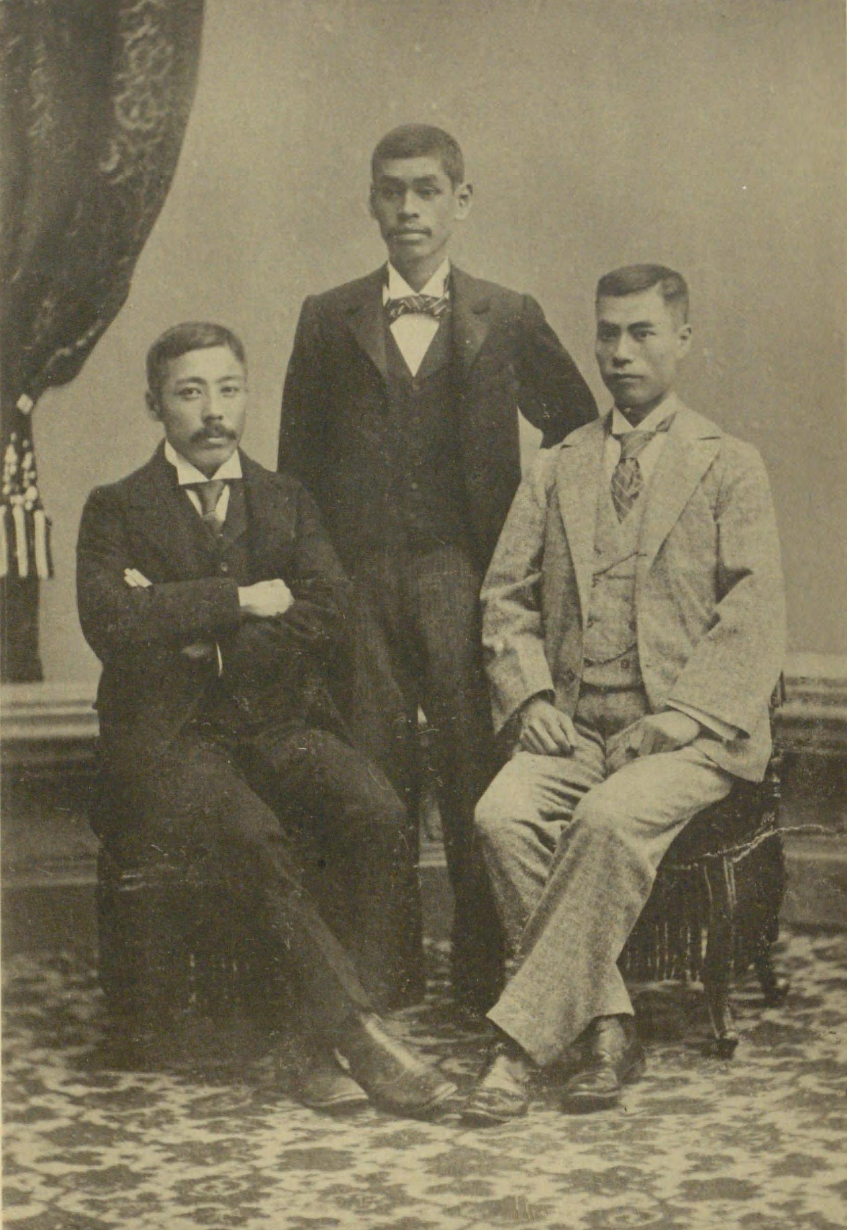 山中定次郎（ニューヨーク） 山中六三郎（ロンドン） 山中繁次郎（ボストン） 合名会社時代 海外三支店主宰者